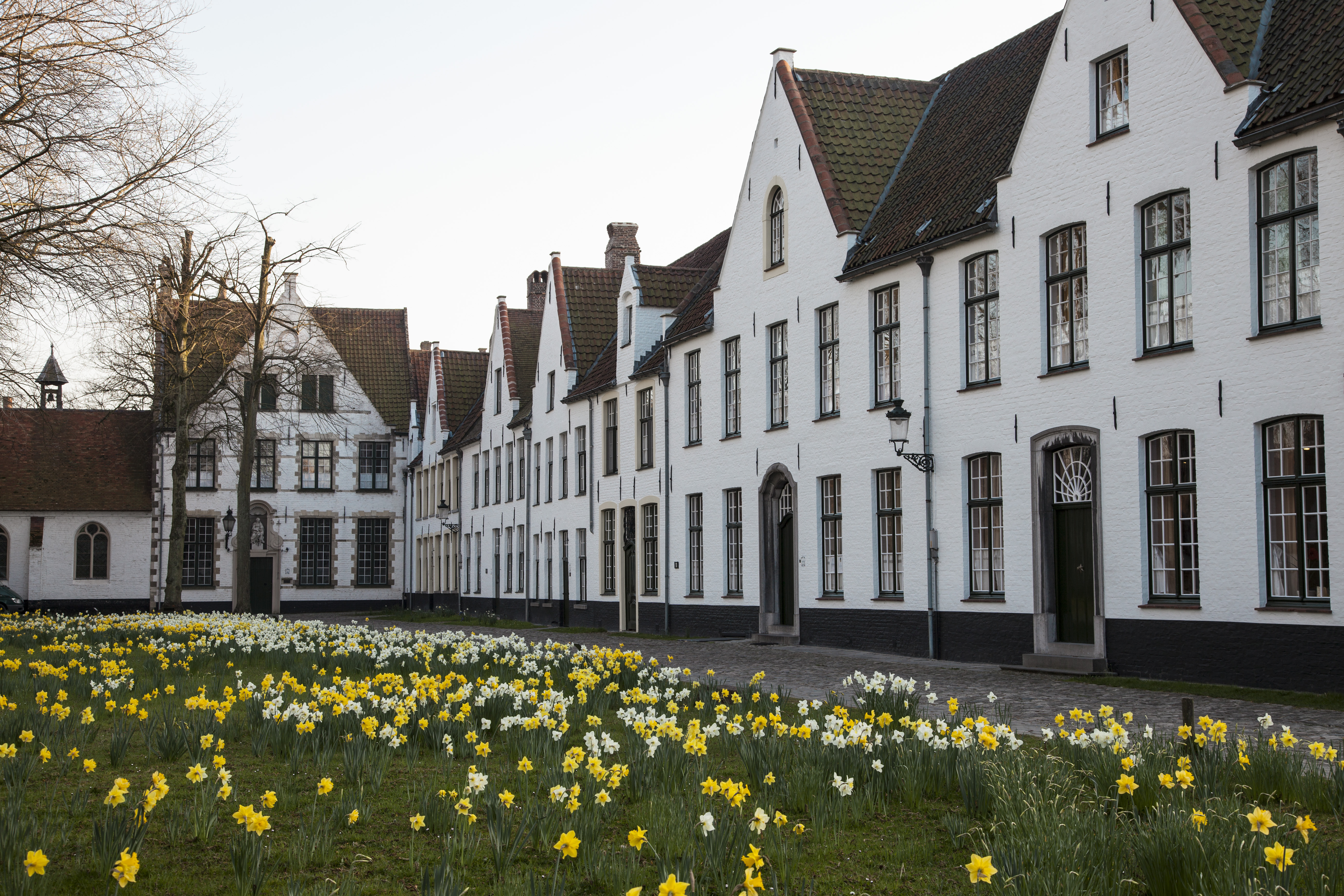 Brugge - Begijnhof 22 tot 30